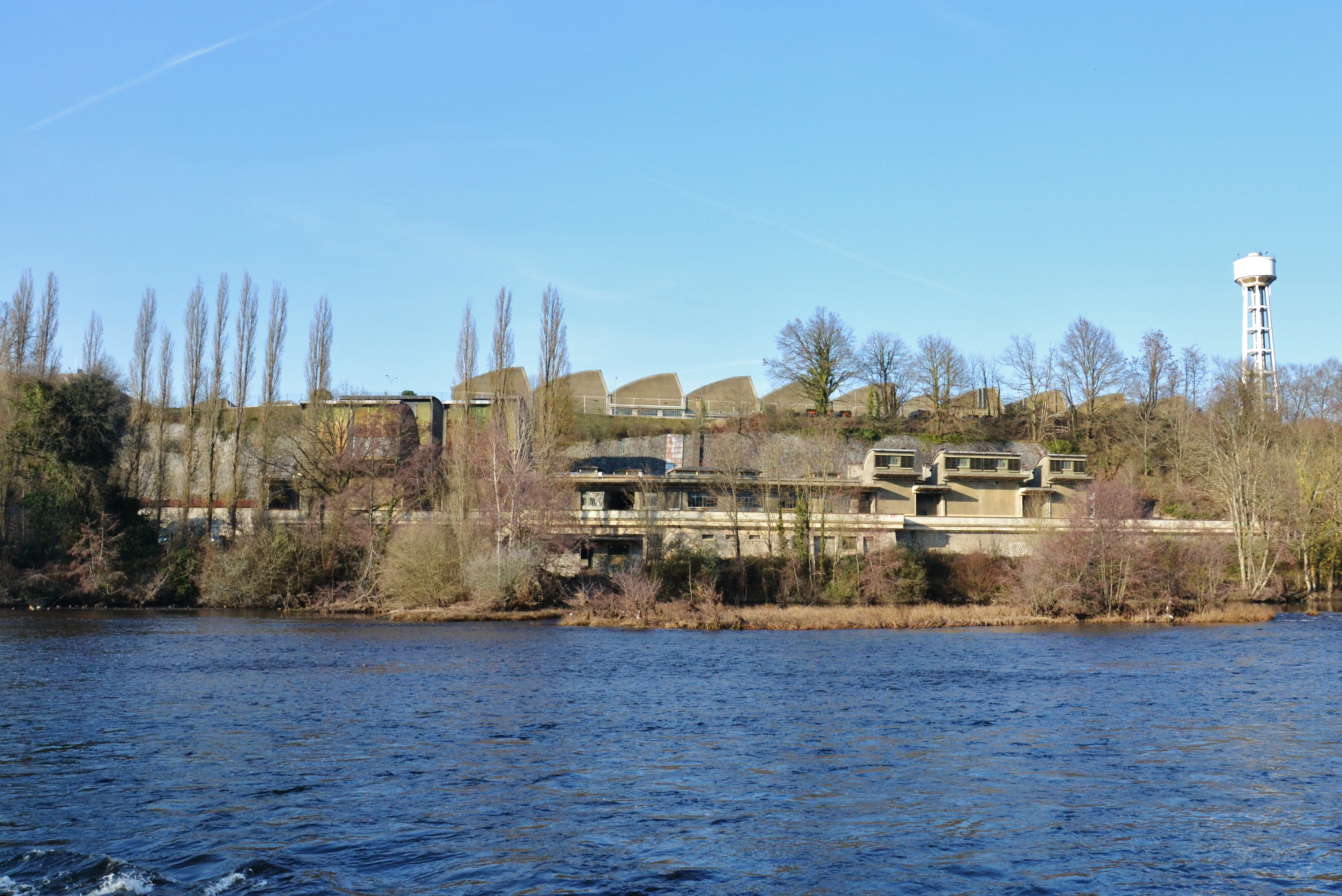 L'usine RVI (Renault Véhicules Industriels) de Limoges (Haute-Vienne, France)